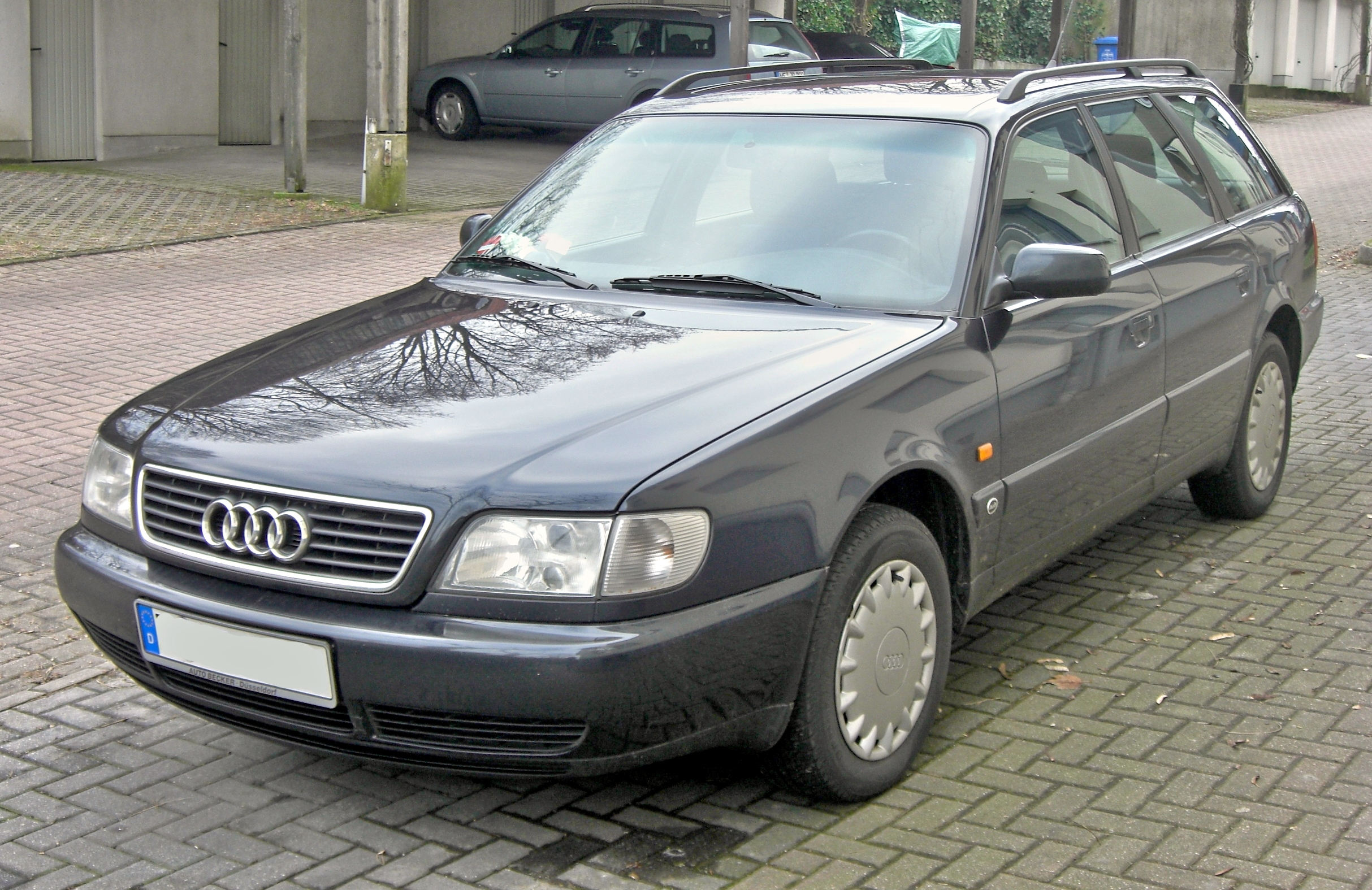 Audi A6 Avant